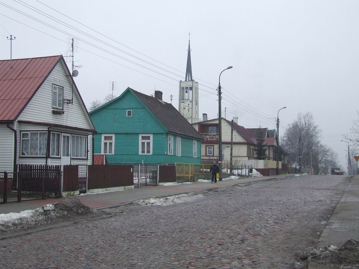 Wasilków, , w tle Kościół parafialny pw. NMP Matki Boskiej Miłosierdzia